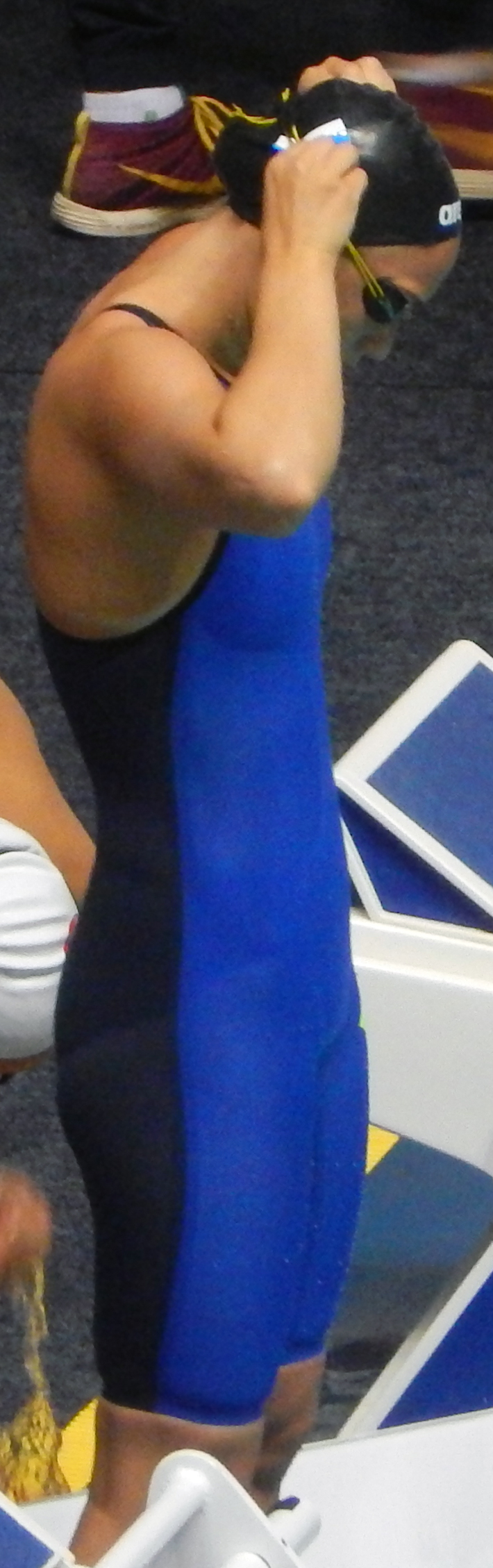 Чемпионат России по плаванию 2018, первый полуфинал на дистанции 50 метров на спине. Дорожка 2 - Ирина Приходько (Татарстан)